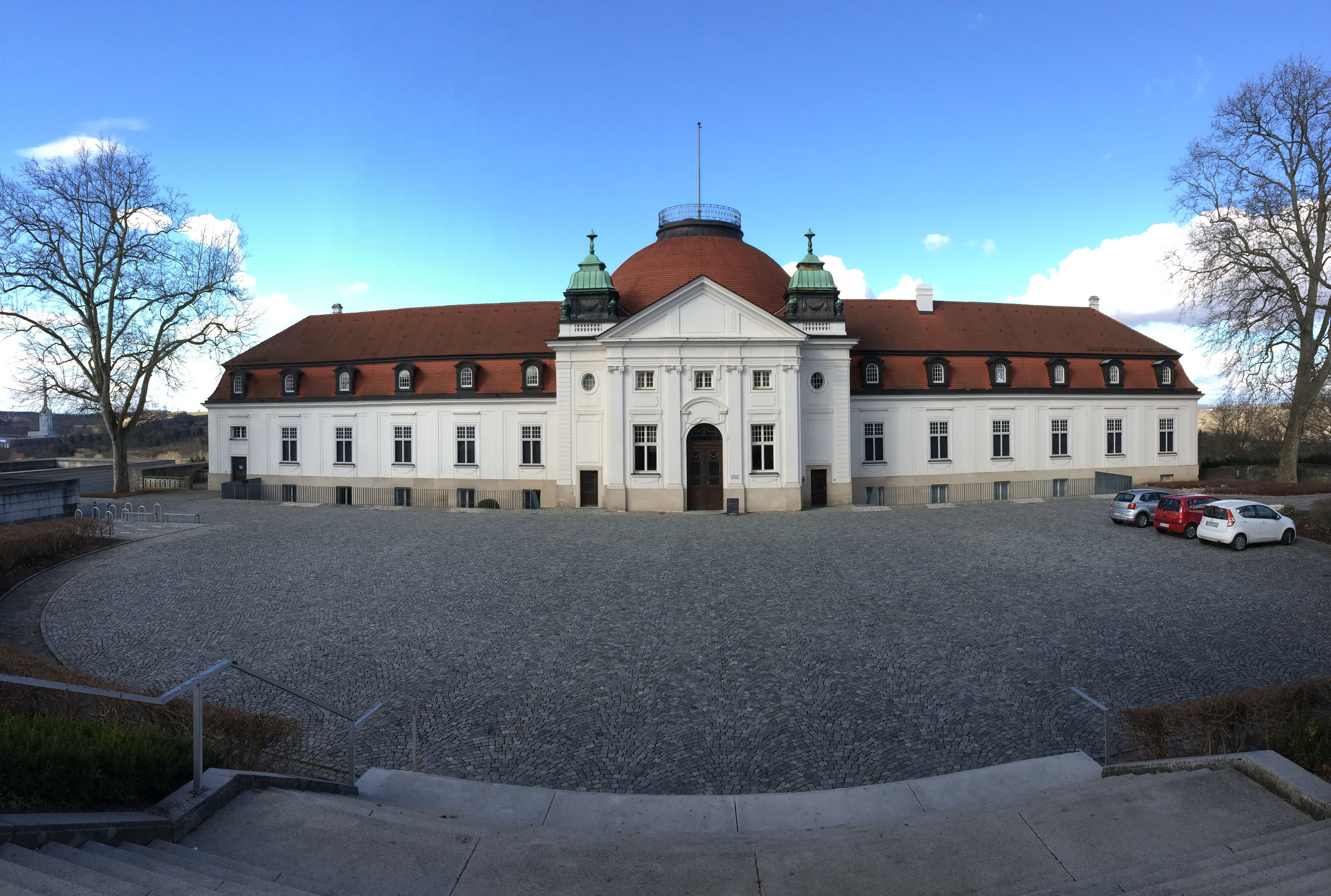 Blick auf den Haupteingang des Schiller-Nationalmuseums, vom Schiller-Denkmal kommend.